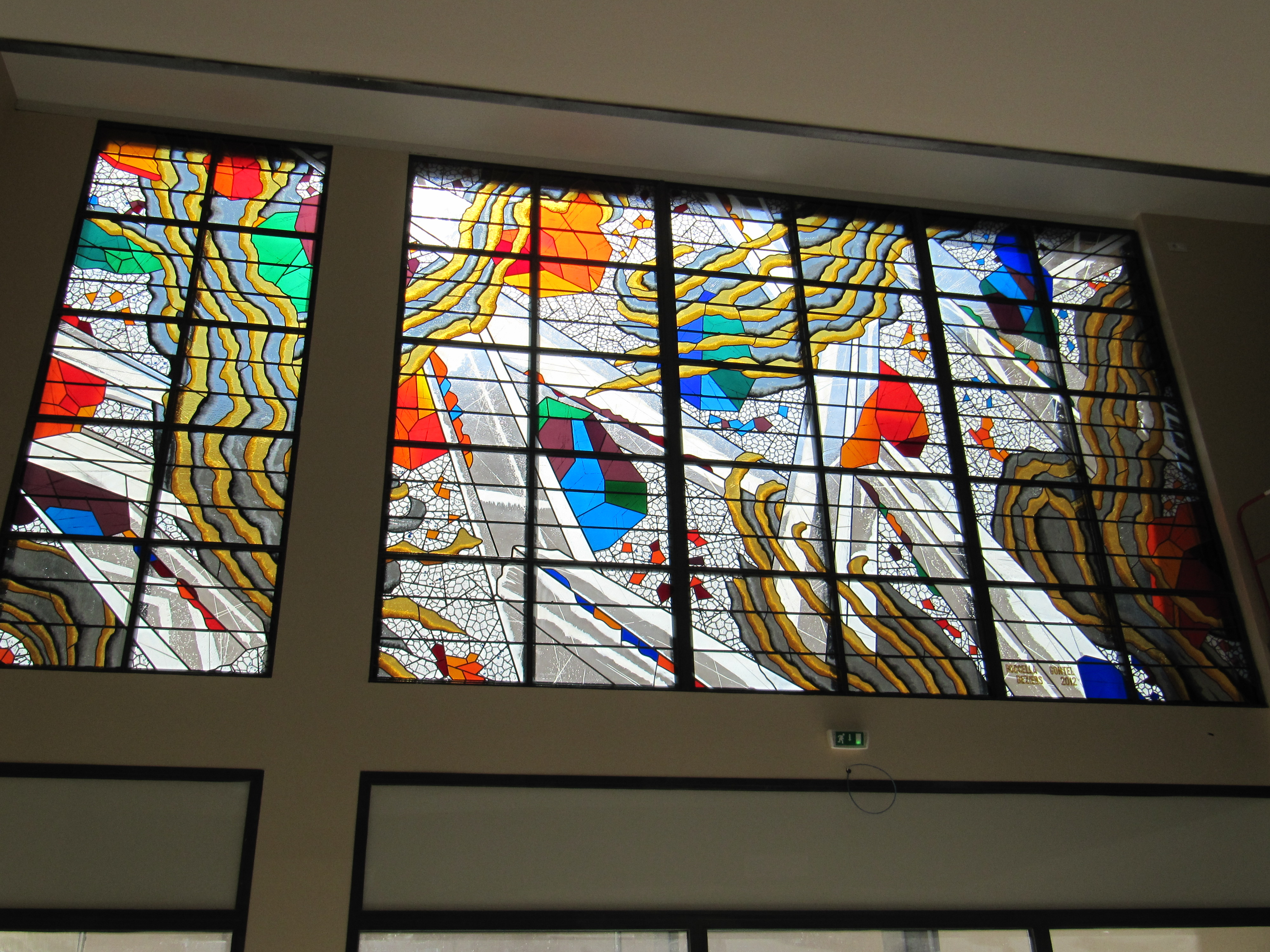 Vitrail de l'office de tourisme d'Agde. Création de Carlo Roccella.